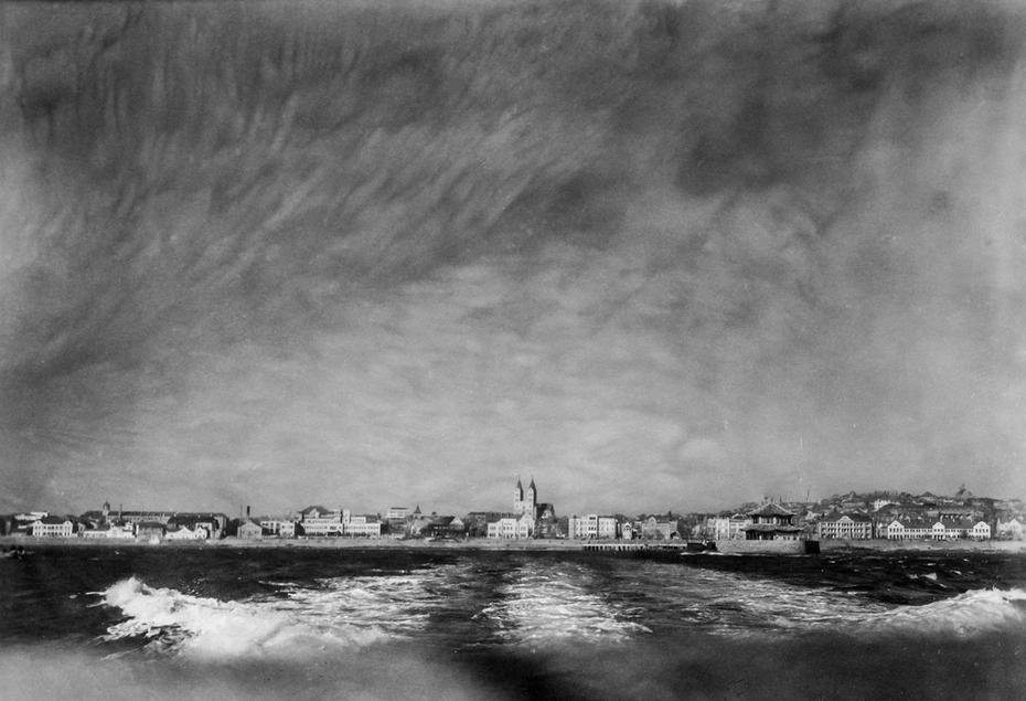 青岛前海远景四十年代